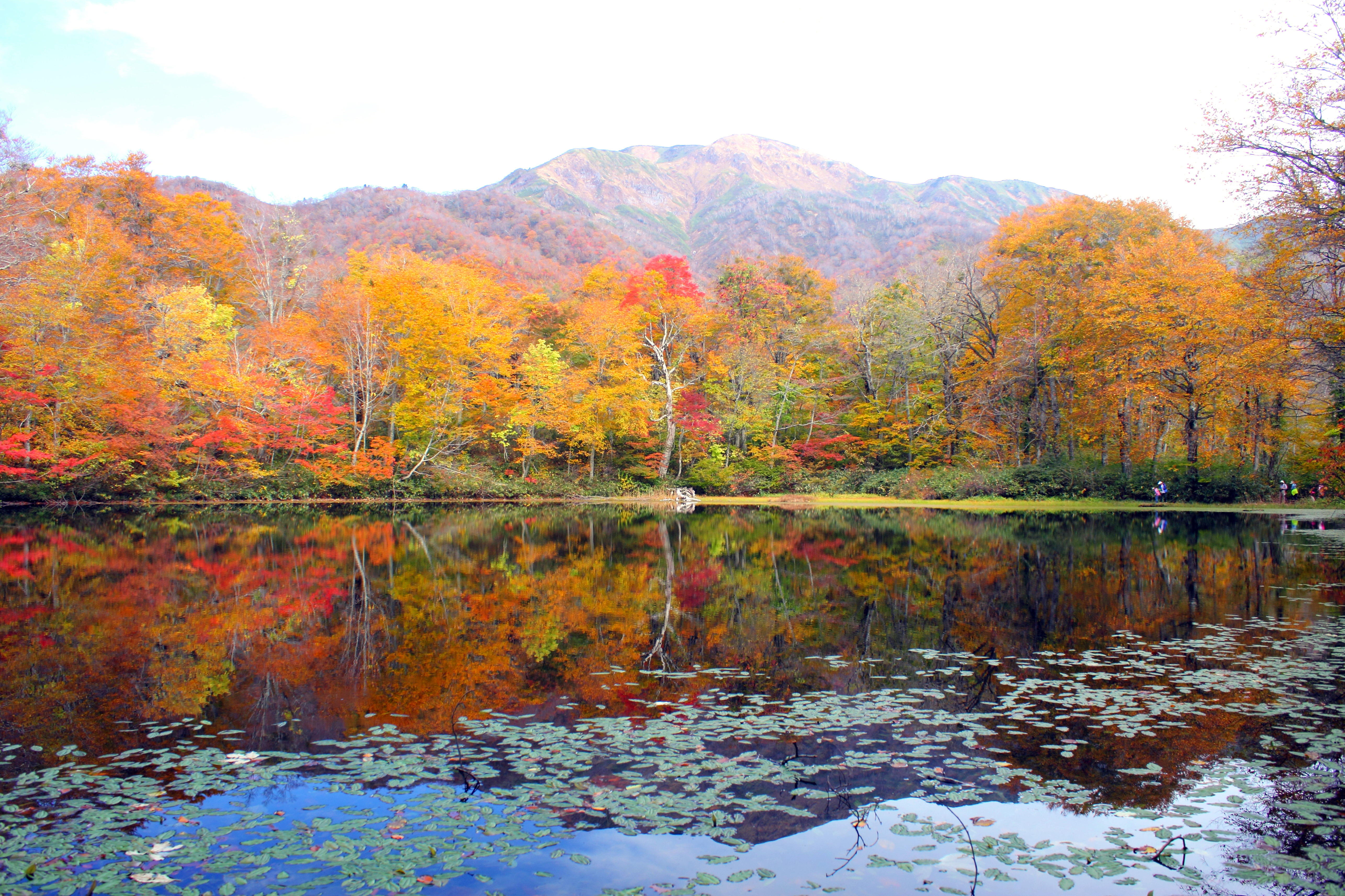 紅葉の刈込池（大野市）